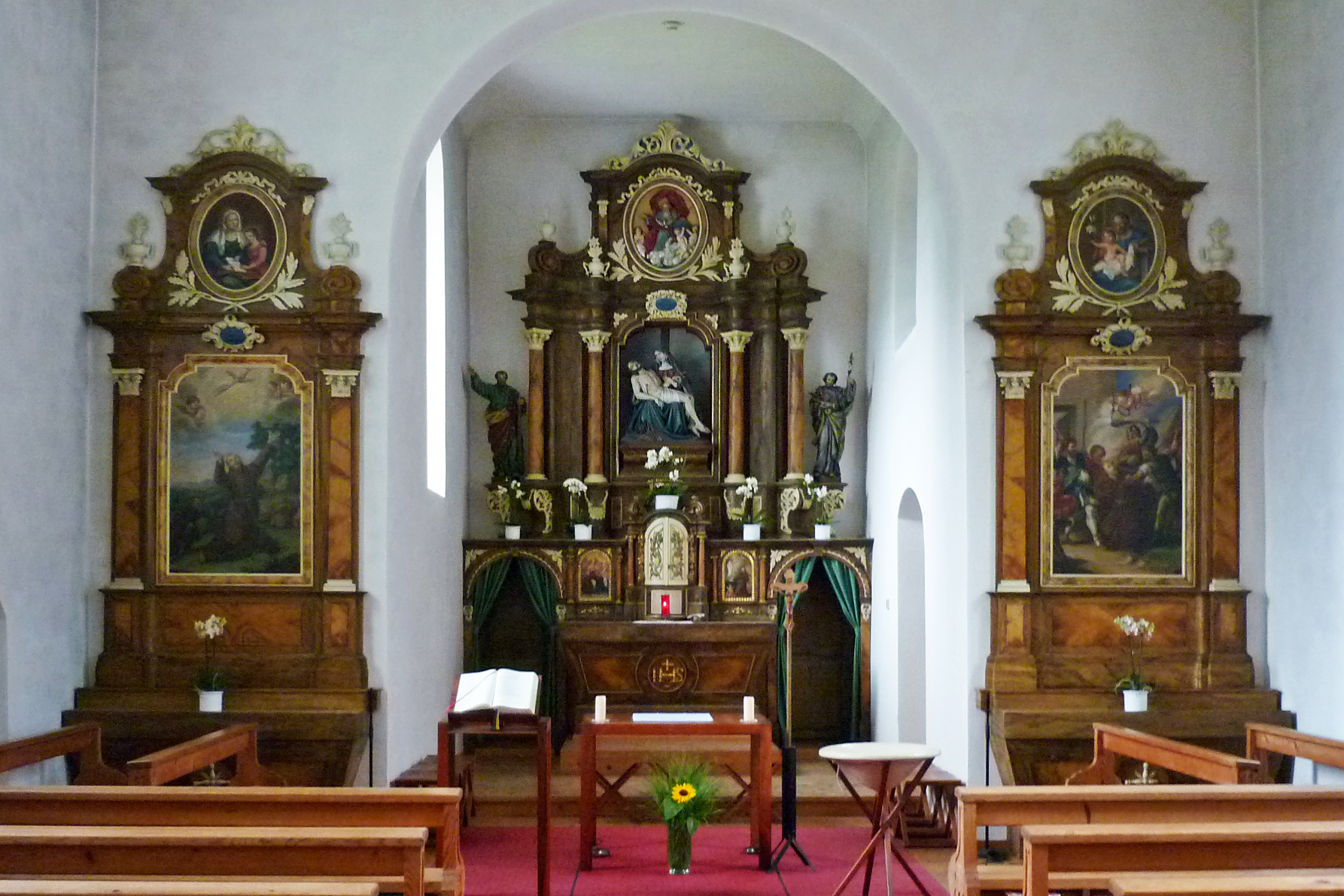 Kapelle am Kloster Gauenstein in Schruns (Montafon)